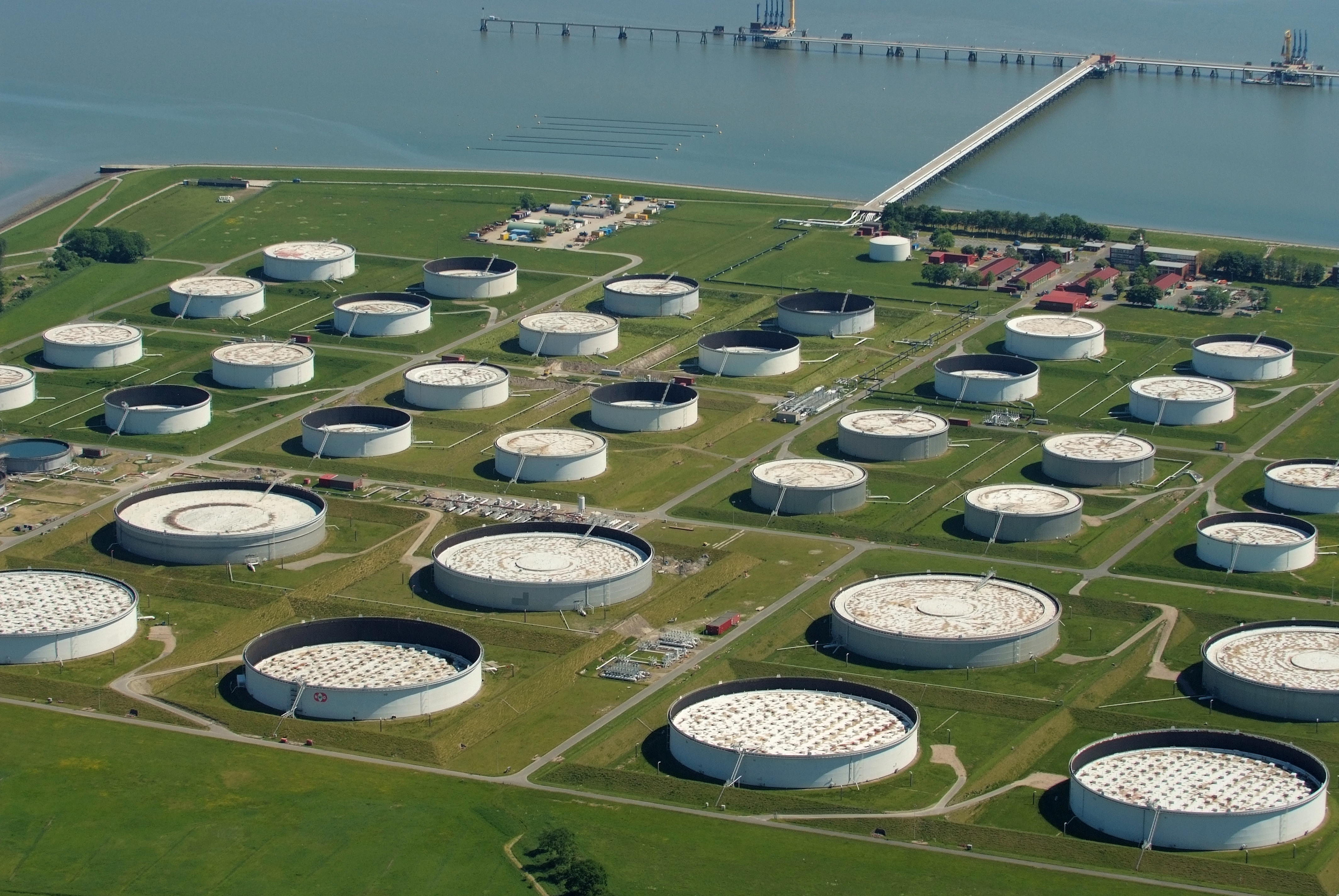 Fotoflug vom Flugplatz Nordholz-Spieka über Cuxhaven und Wilhelmshaven, hier zu sehen: Mineralöltanklager der Nord-West Oelleitung.